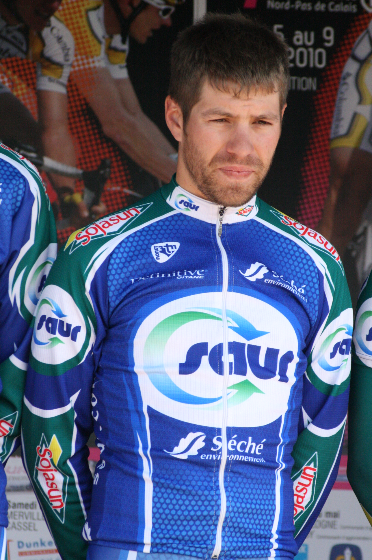 Cyril Lemoine lors de la présentation des équipes des 4 jours de Dunkerque 2010